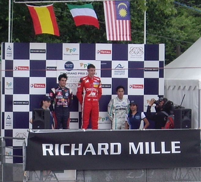 Raffaele Marciello vainqueur du GP de Pau 2012